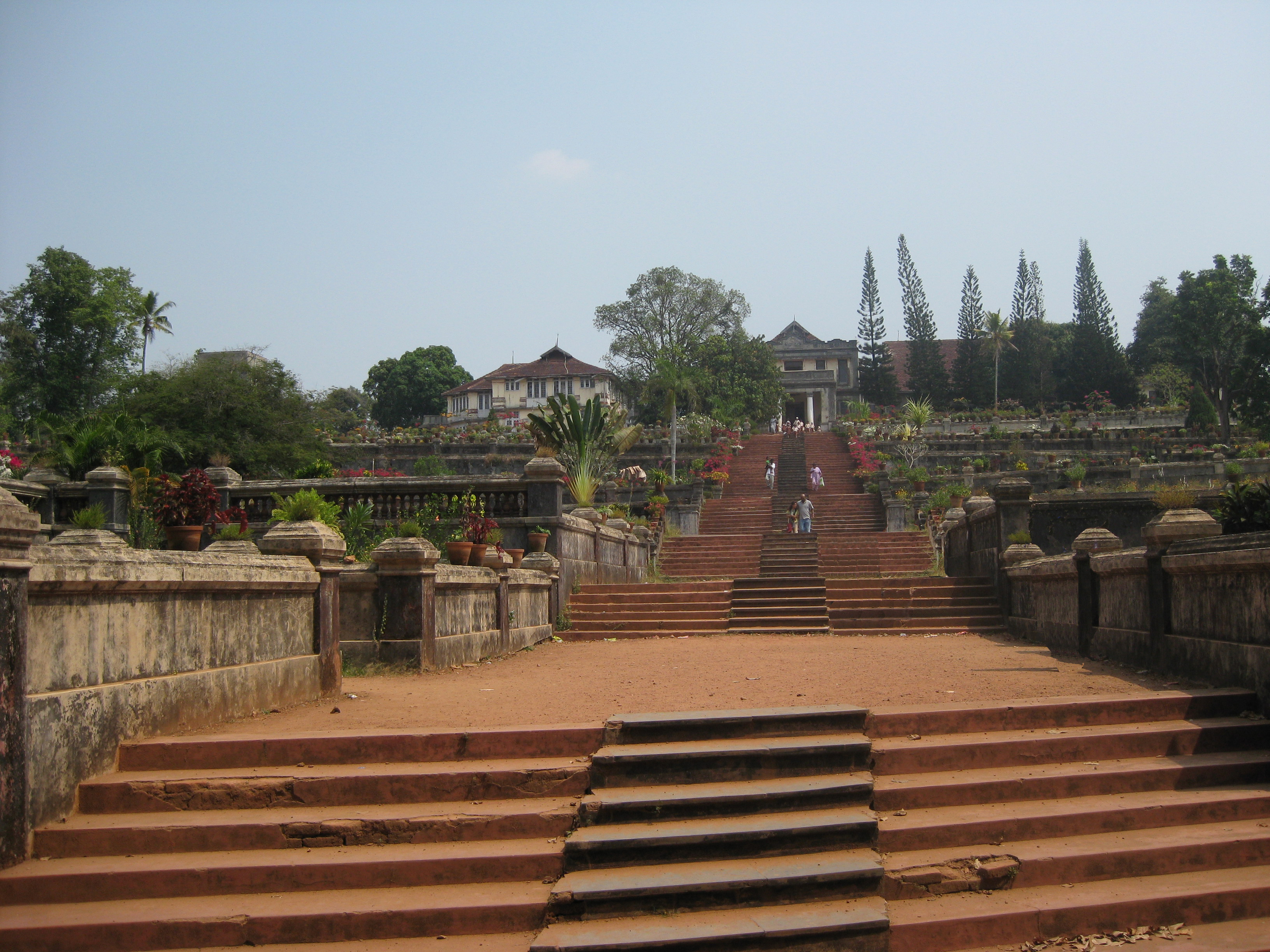 ത്രിപ്പൂണിത്തുറ ഹിൽ പാലസ്